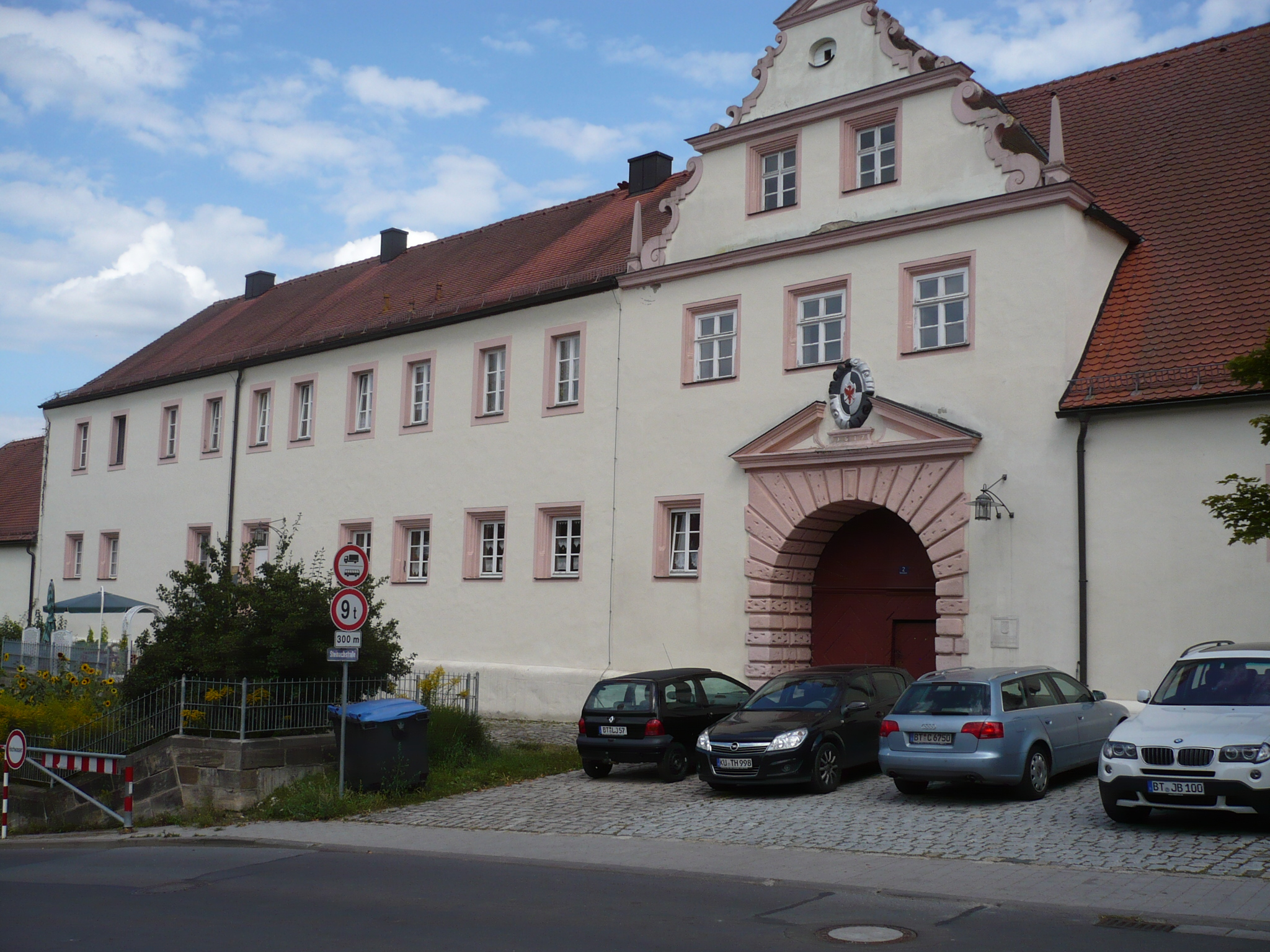 Bayreuth, ehem. Schloss St. Johannis, Steinachstrasse 2, Denkmal Nr. D-4-62-000-410